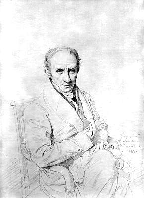 Portrait au crayon de Francois Pouqueville